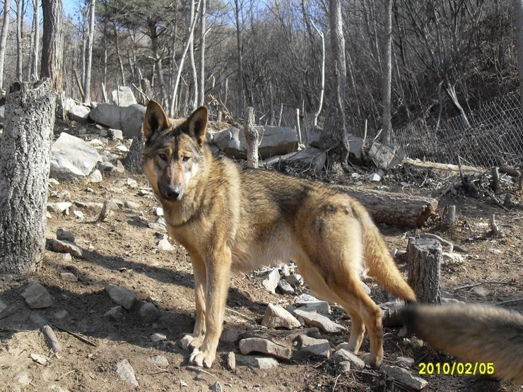 늑대아빠가 키우는 울프독